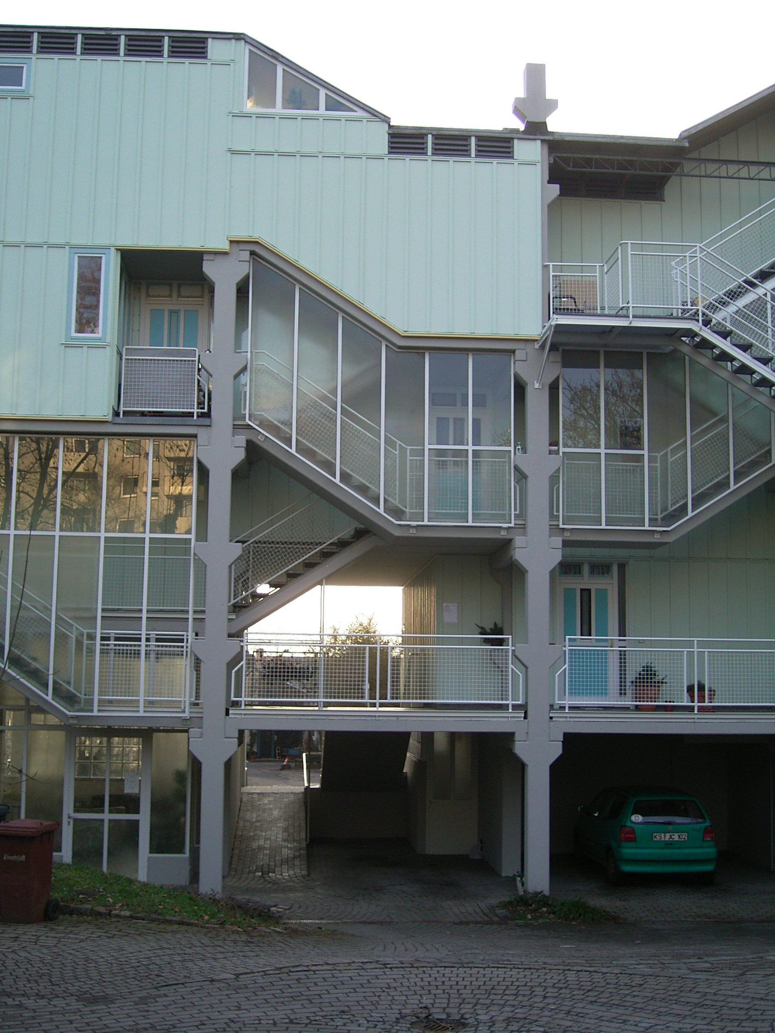 documenta urbana Wohngebäude in Kassel 1979-1982. Otto Steidle und Partner